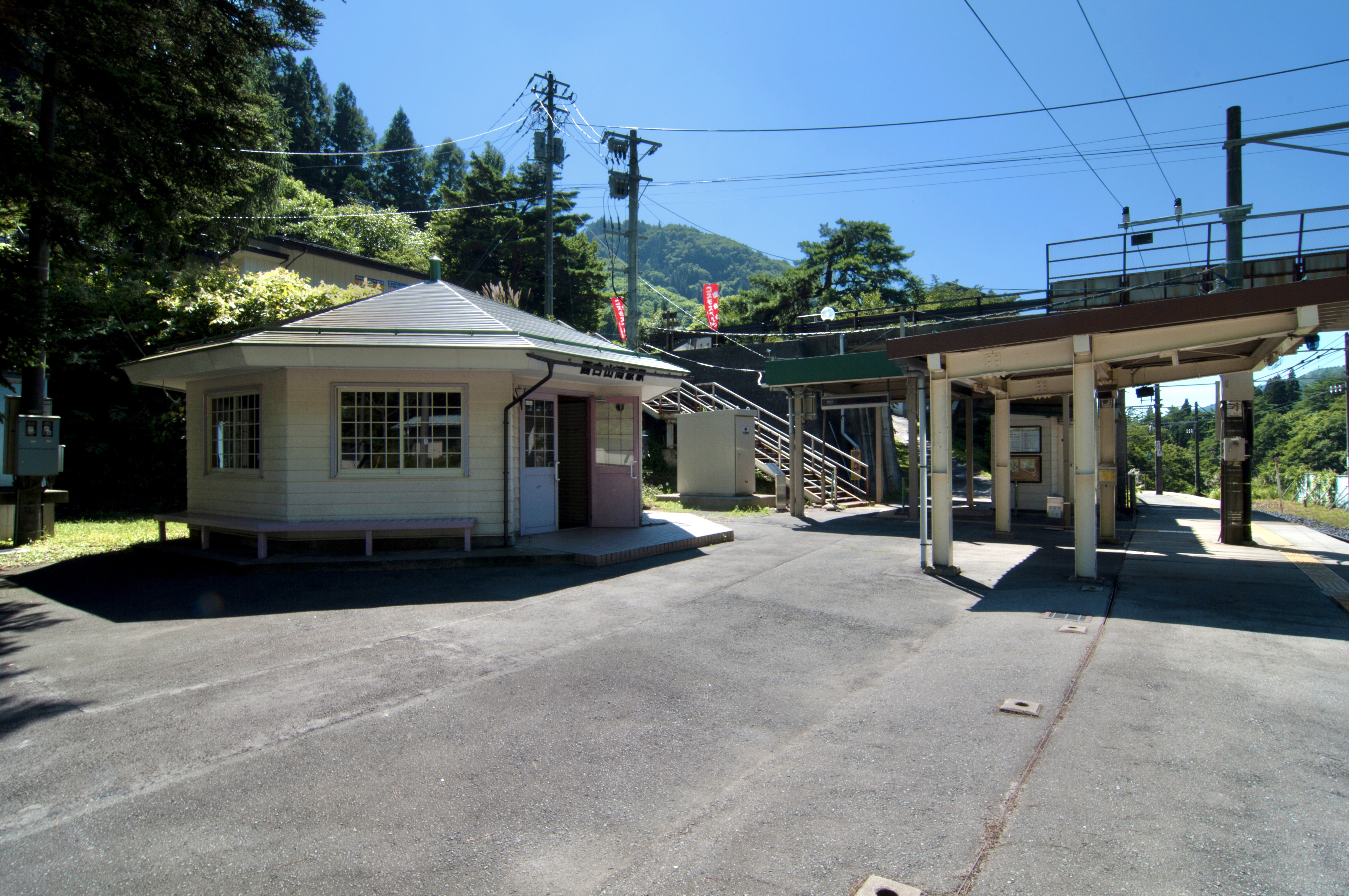 東日本旅客鉄道仙山線面白山高原駅